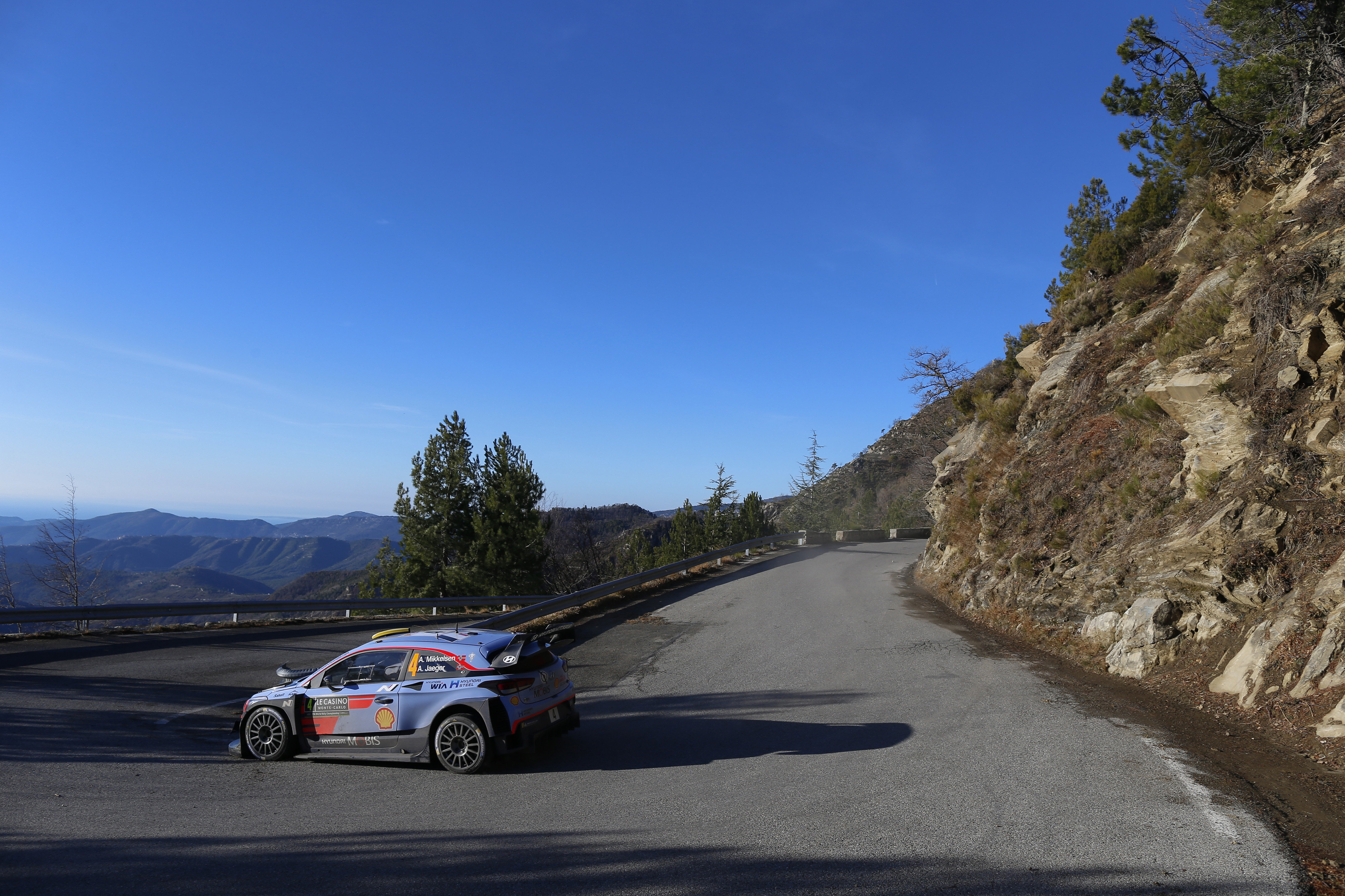 Rajd Monte Carlo 2018 Andreas Mikkelsen